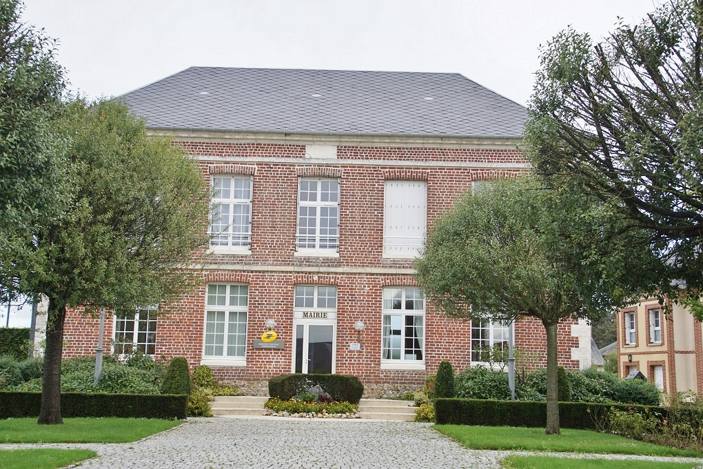 la Mairie